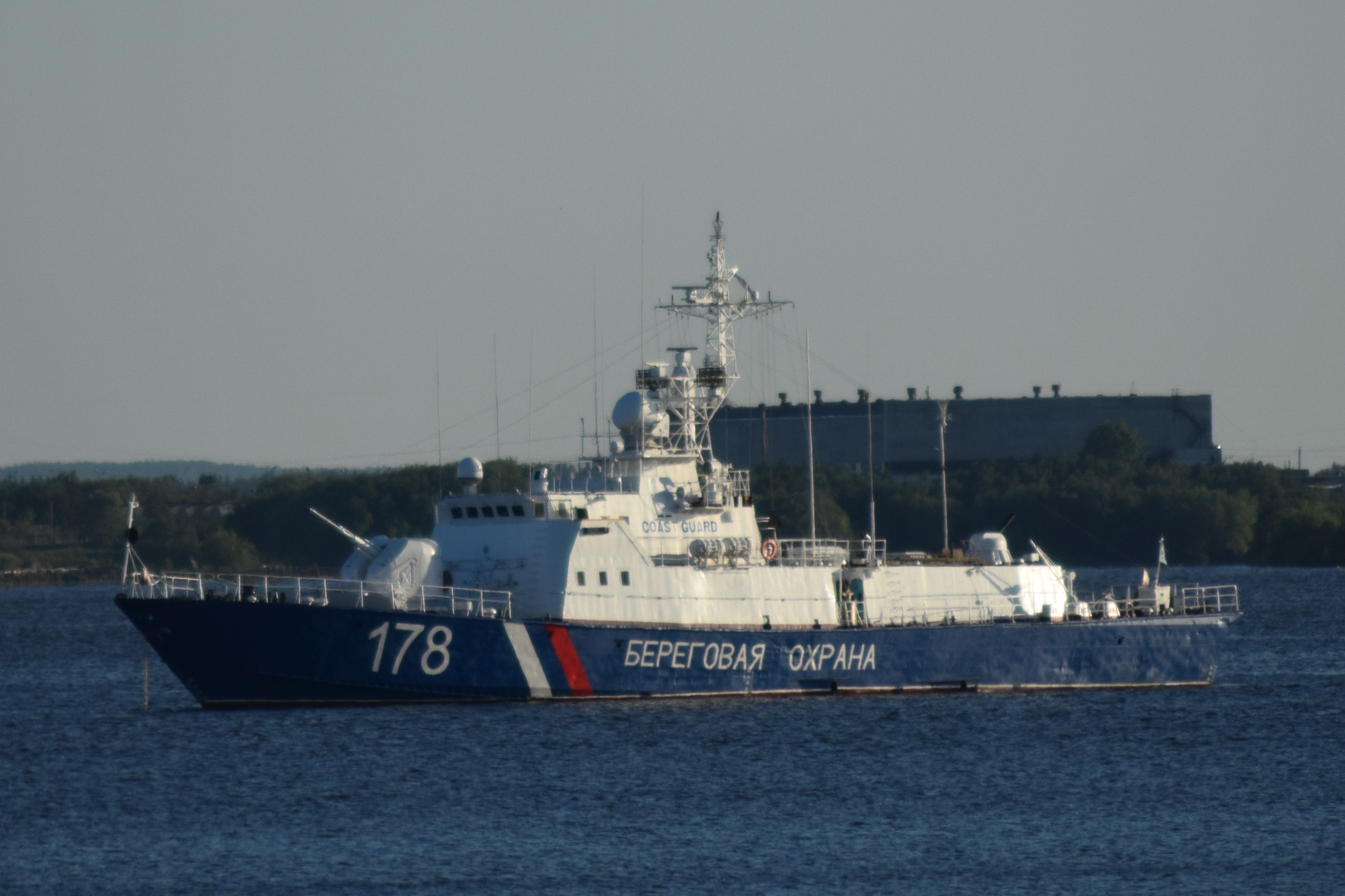 Syktyvkar ship 178, Arkhangelsk Корабль "Сыктывкар" береговой охраны России, Архангельск